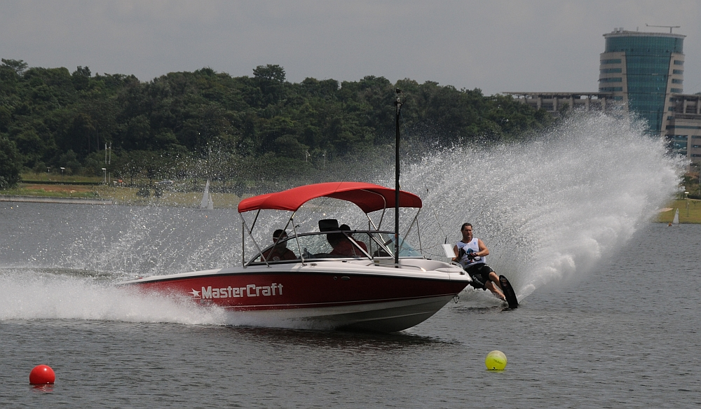 PUTRAJAYA WATER SKI AND WAKEBOARD WORLD CUP MasterCraft